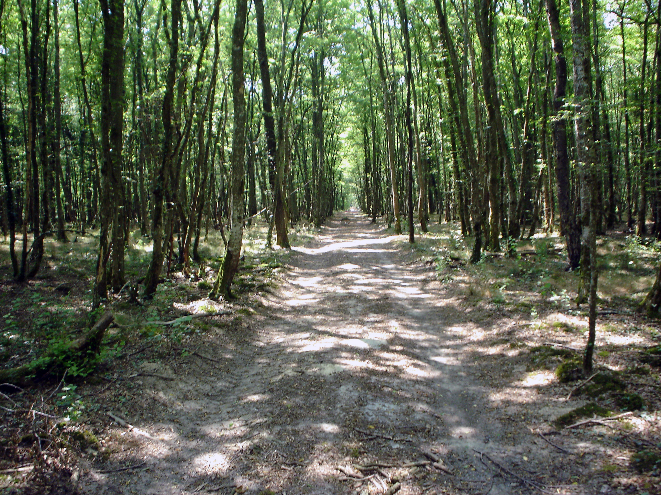 Photo forêt d'Orléans à Saran, Loiret.